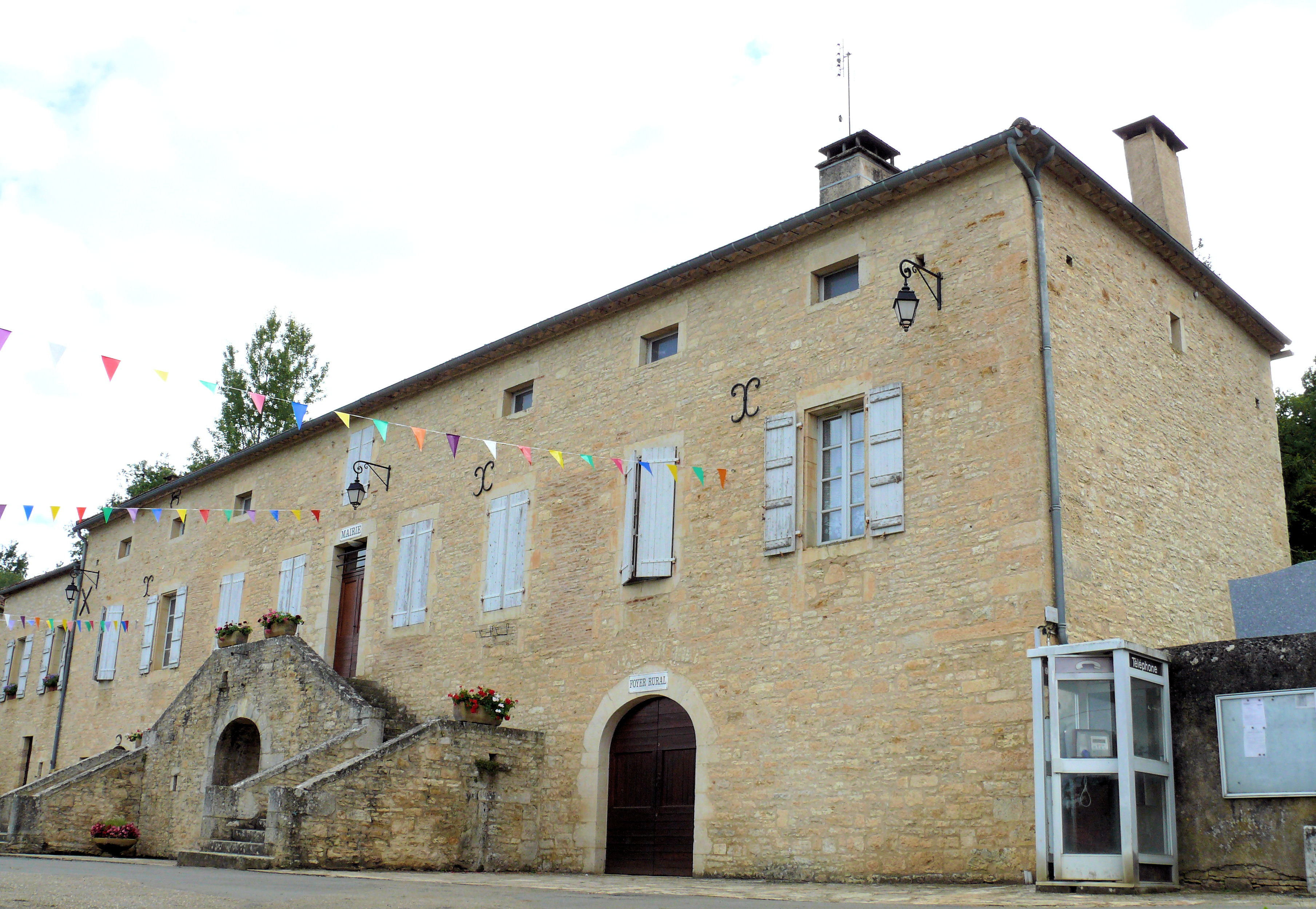 Pontcirq - Mairie et foyer rural. Dans ce dernier est installé le café associatif La Gariotte ouvert en 2014